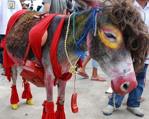 Desfile de disfrases